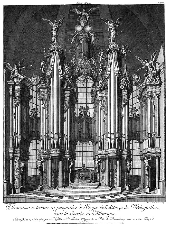 Prospekt der Großen Orgel des Münsters St. Martin und Oswald in Weingarten von Joseph Gabler. Stich aus: Dom Bedos de Celles, L'art du facteur d'orgues, 1766